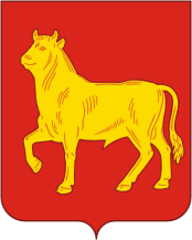 Герб Куйбышева (Новосибирская область)